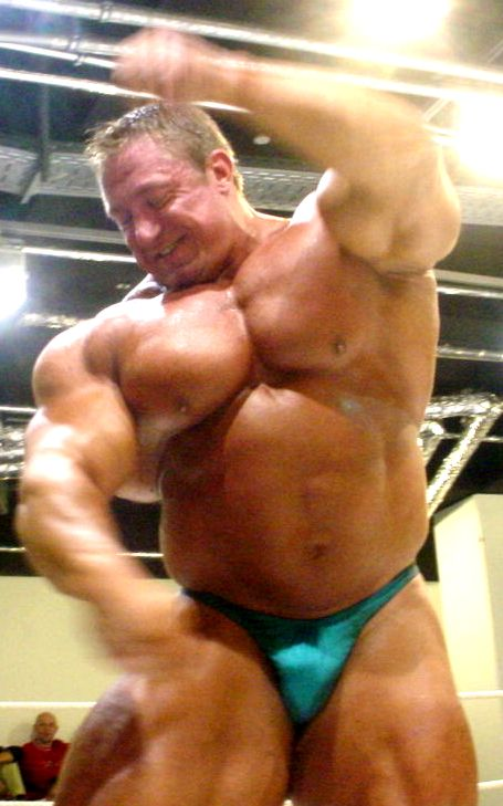 Bodybuilder Markus Ruehl beim Posen